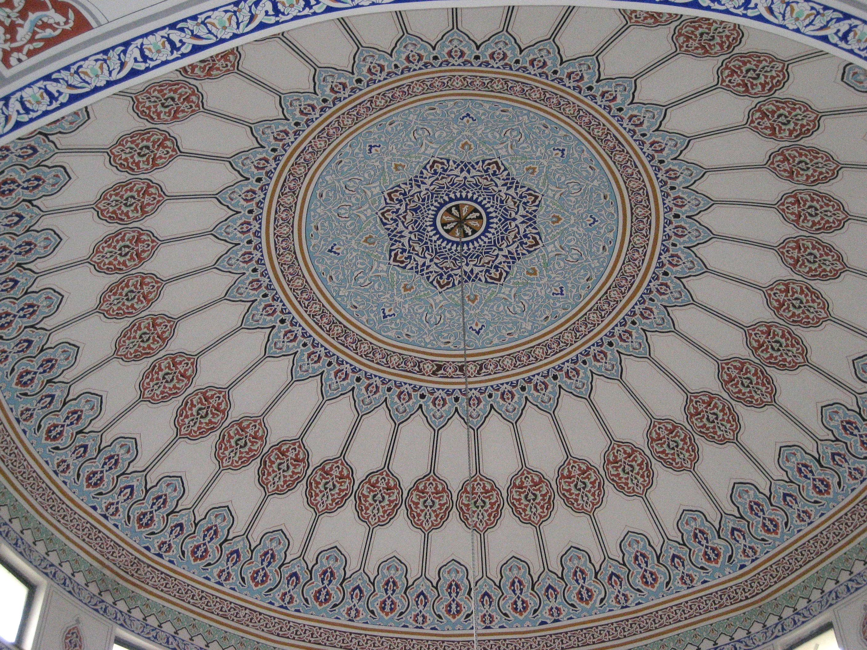 Kartal Cemevi, die Decke des Gebetshauses